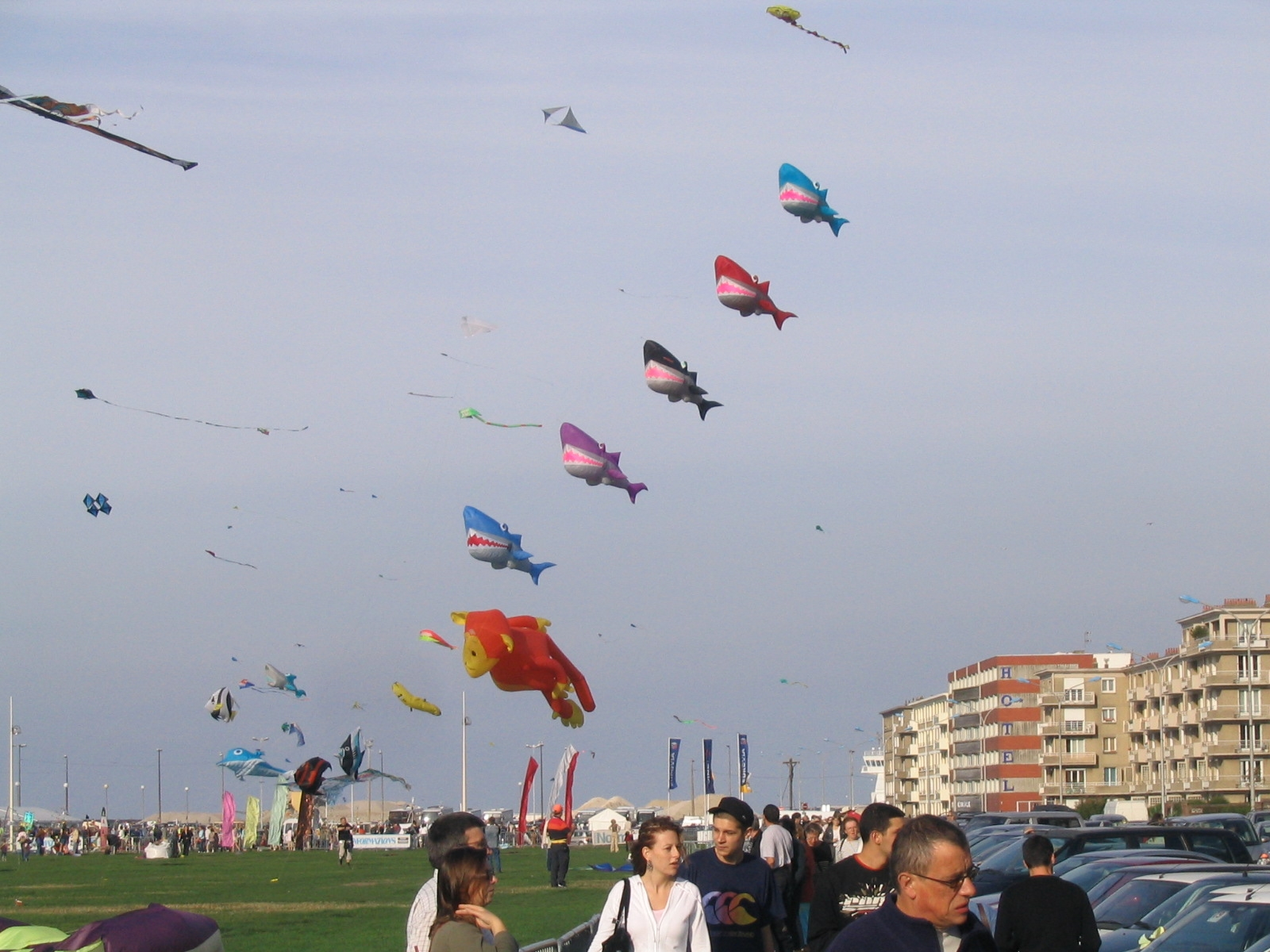 Lors du festival international des cerf-volants de Dieppe en 2006